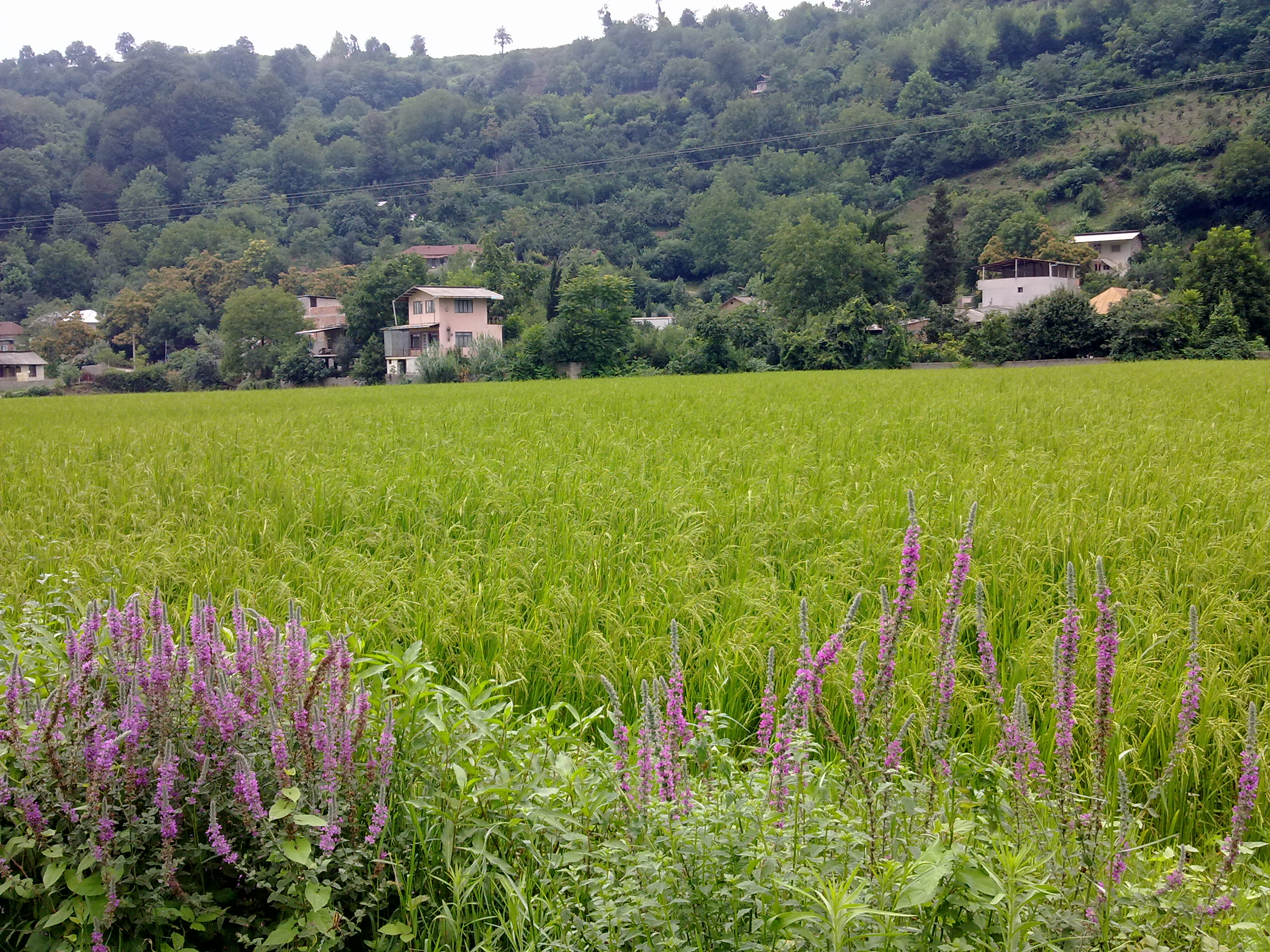 Ahoudasht-Sari-Mazandaran-Iran